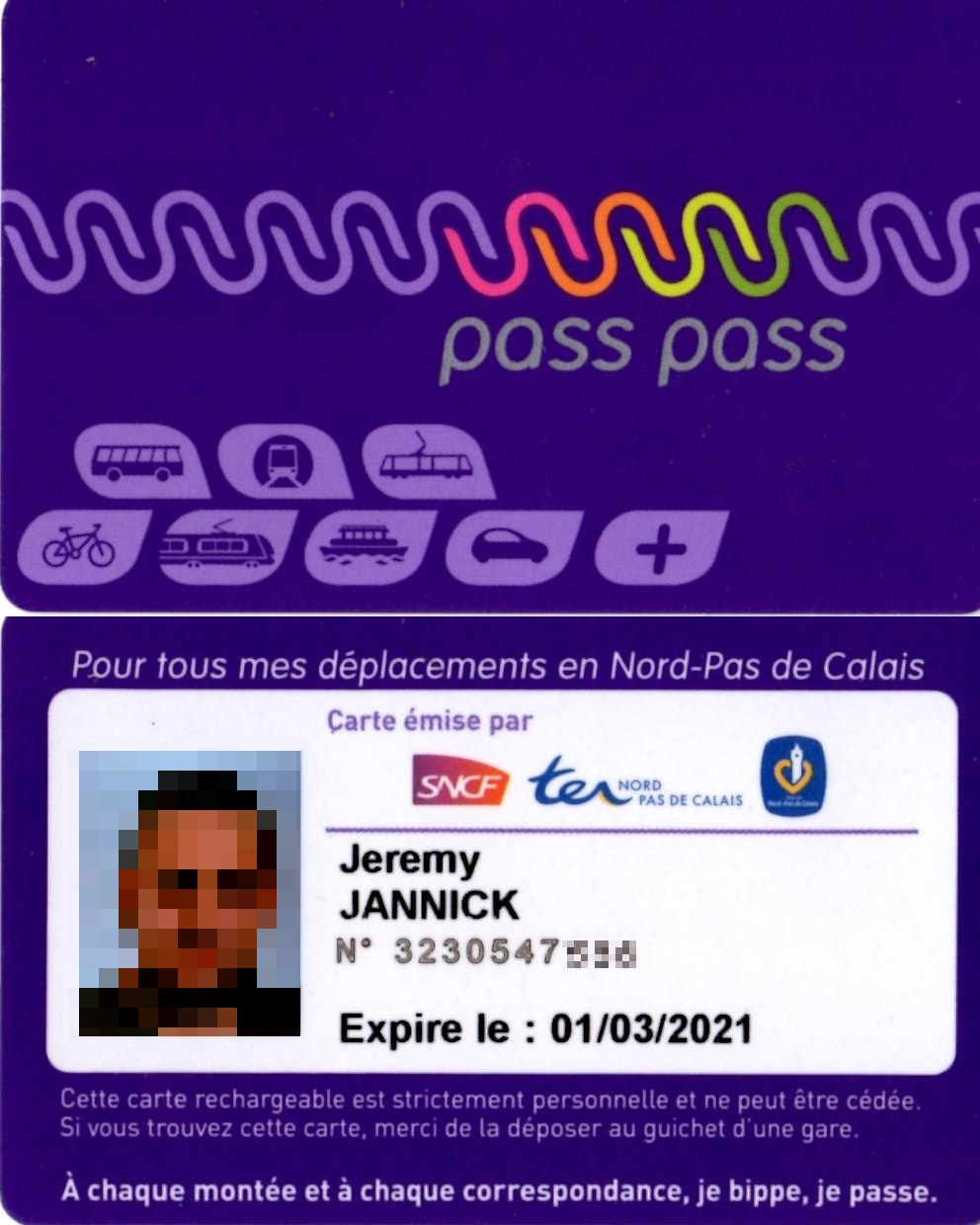 Carte Pass Pass, notamment utilisée pour le TER Nord-Pas-de-Calais.